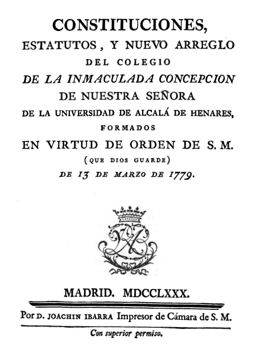 Constituciones del 13 de marzo de 1779 del Colegio de la Inmaculada Concepción de Nuestra Señora de la Universidad de Alcalá.